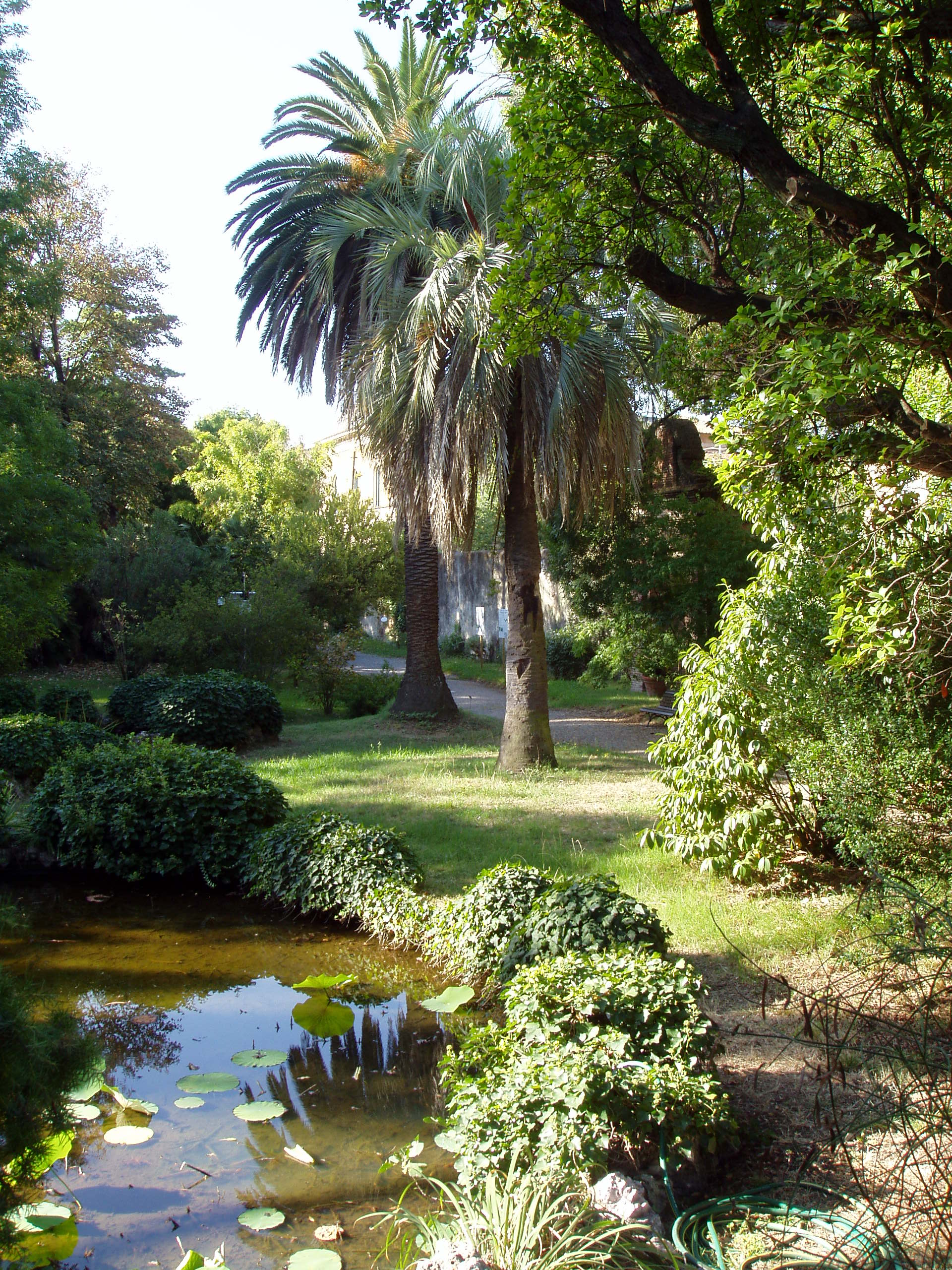 Orto botanico di Pisa - general view. Pisa, Italy.